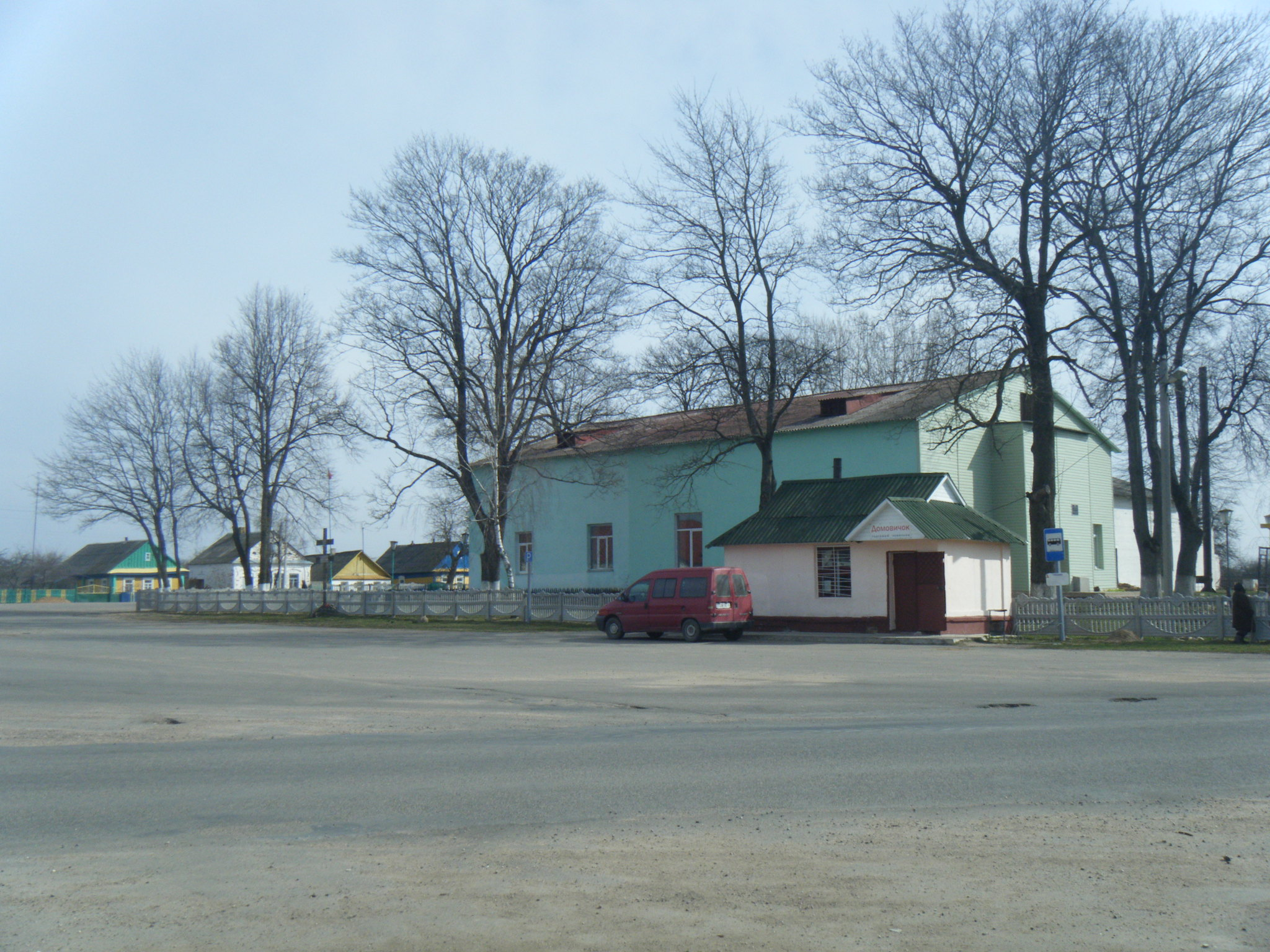 Здание бывшей синагоги в аг. Грозово (Копыльский район, Минская область, Белоруссия). Сейчас - церковь. Беларуская (тарашкевіца): Аг. Грозаў Капыльскага раёну Менскай вобласьці Беларусі